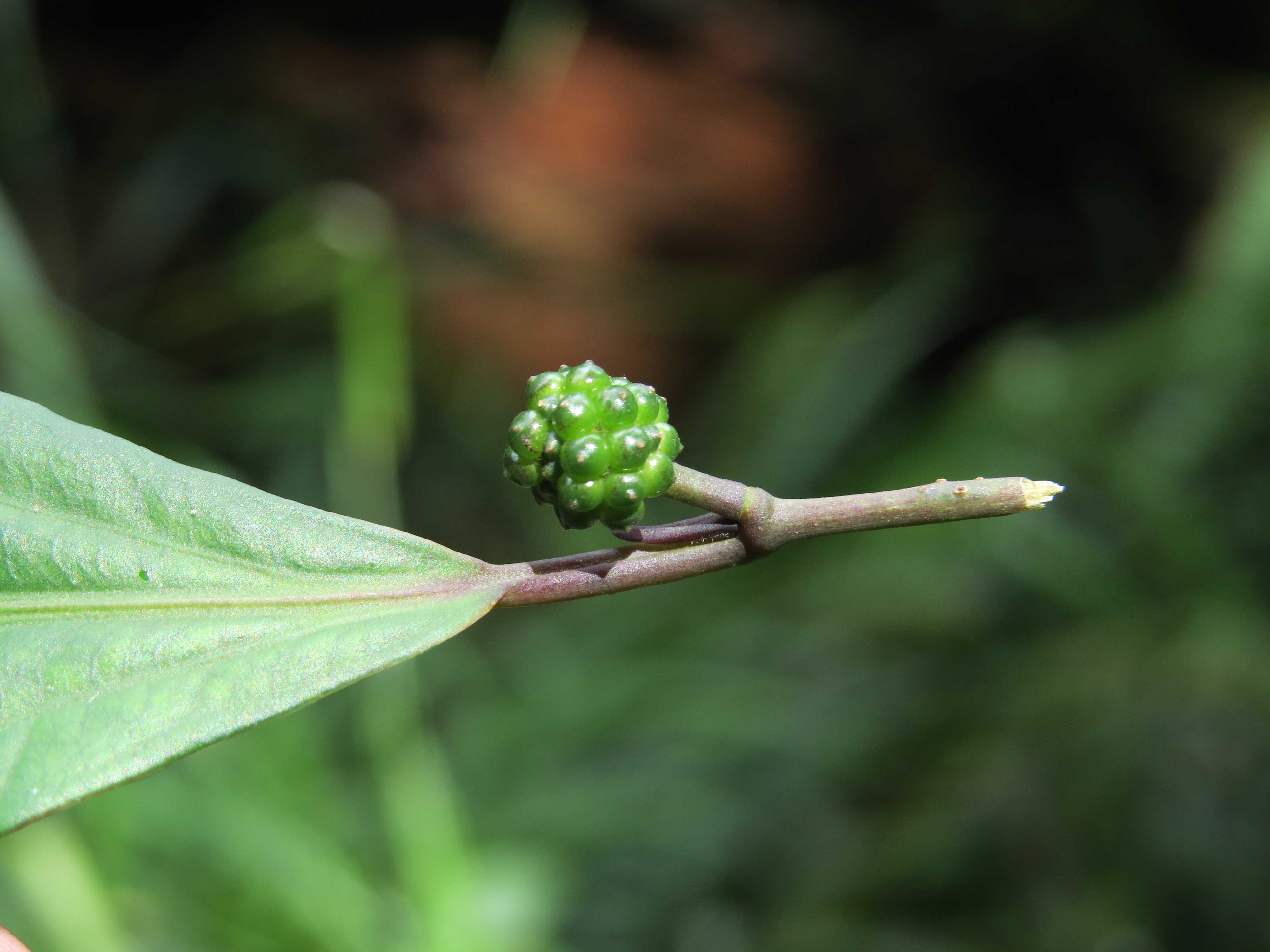 Photos taken at Mannavan Shola, Anamudi Shola National Park, Kerala during Munnar Butterfly Survey